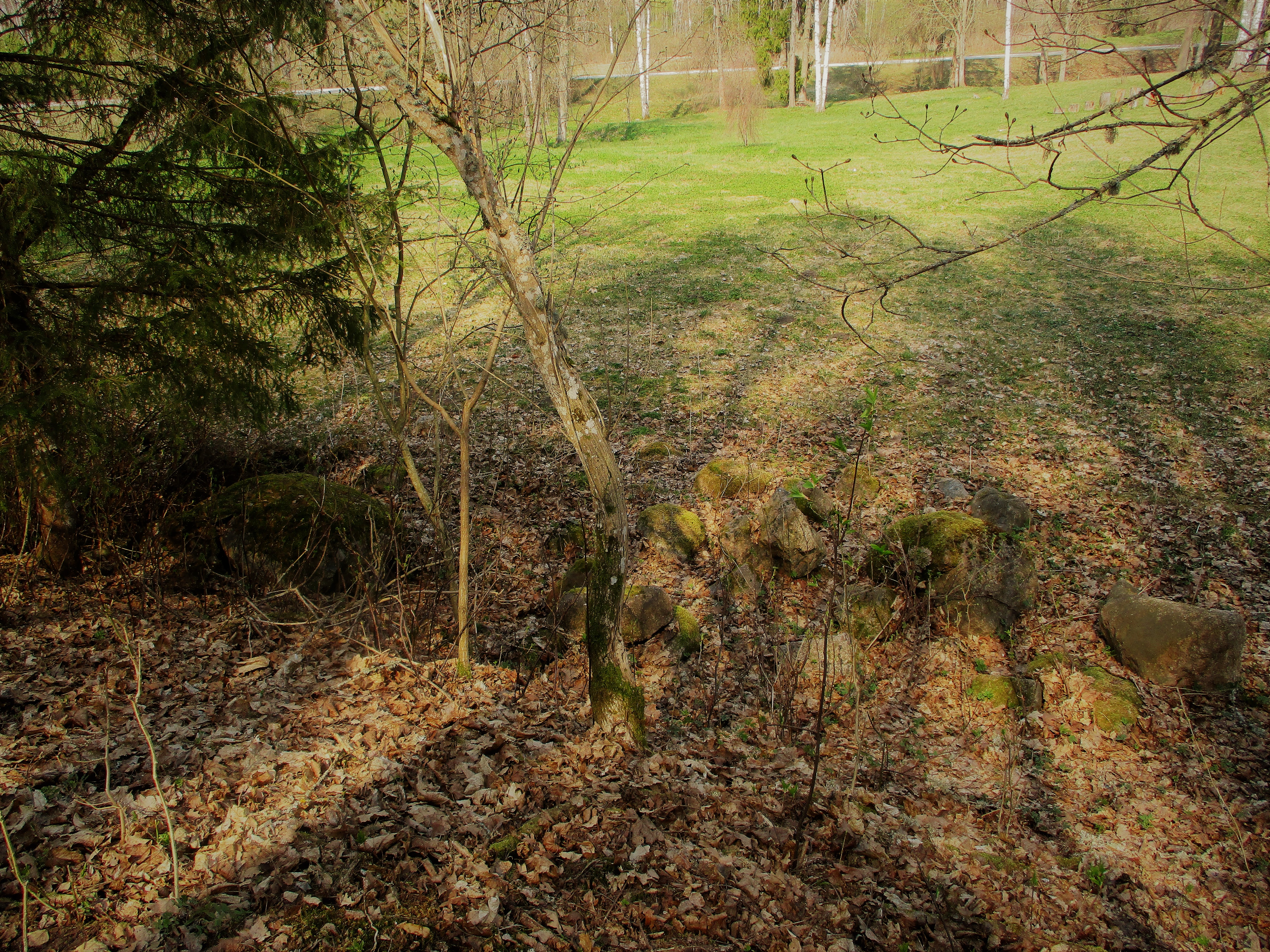 Vaade linnuseala põhjapoolselt vallilt põhja poole, oja suunas.